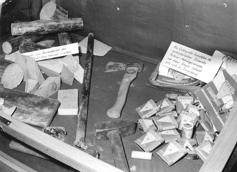 Zentralbild-Junge -1.2.1962 Gefährliche Provokation an der Staatsgrenze der DDR-Durch Agentenschleuse Eisenbahnverkehr aufs äusserste gefährdet. Ein neues eklatantes Beispiel für die friedensgefährdende Rolle der Westberliner Frontstadt-Politik ist am 1.2.1961 auf einer internationalen Pressekonferenz in Berlin enthüllt worden. Vor in- und ausländischen Journalisten, darunter Vertretern westdeutscher Zeitungen informierte der Minister für Verkehrswesen der DDR, Erwin Kramer, auf dem Gelände des S-Bahnhofes Wollankestrasse über die ungeheuerliche Tatsache, dass Westberliner Banditen unter gröbster Verletzung der Staatsgrenze der DDR durch die Gewölbe dieses Bahnhofes ein Stollensystem vorgetrieben haben. Durch die Anlage dieses Stollensystems sollten Agenten und Diversanten von Westberlin in das Gebiet der DDR eingeschleust werden. UBz: In Schaukästen ausgestelltes Material, das von den Tätern am Tatort hinterlassen wurde, u.a. Taschenlampenbatterien westlicher Herkunft, die zu Beleuchtungszwecken bei der Tatausführung benutzt wurden.